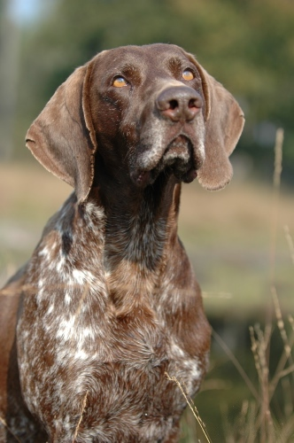 Duitse staande korthaar reu.